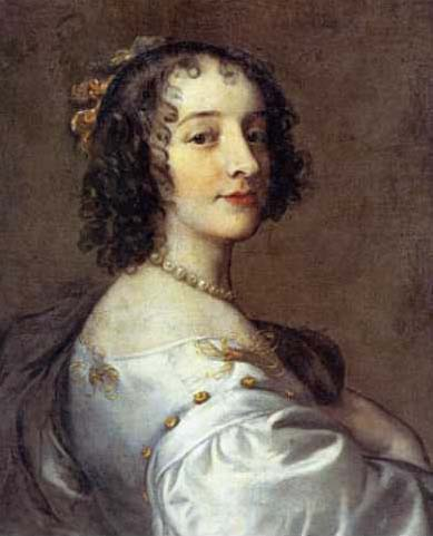 Sophie von der Pfalz (1630-1714), Tochter des Friedrich V. von der Pfalz, 1658 Heirat mit Ernst August von Hannover